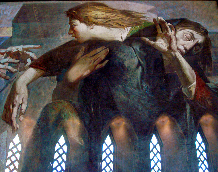 Via Crucis na Igreja de São Pelegrino, Caxias do Sul, Brasil.